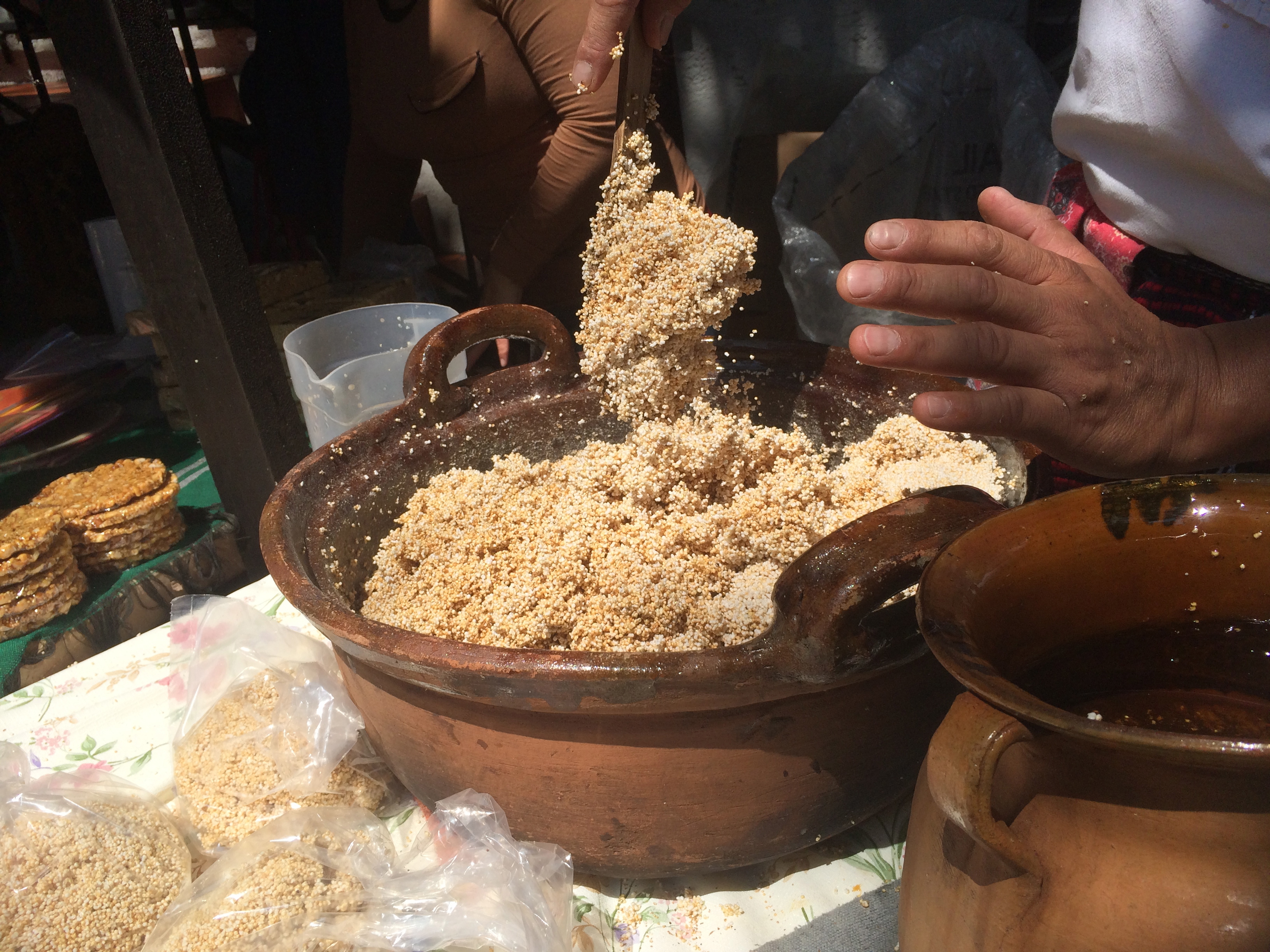 Mezclando el amaranto